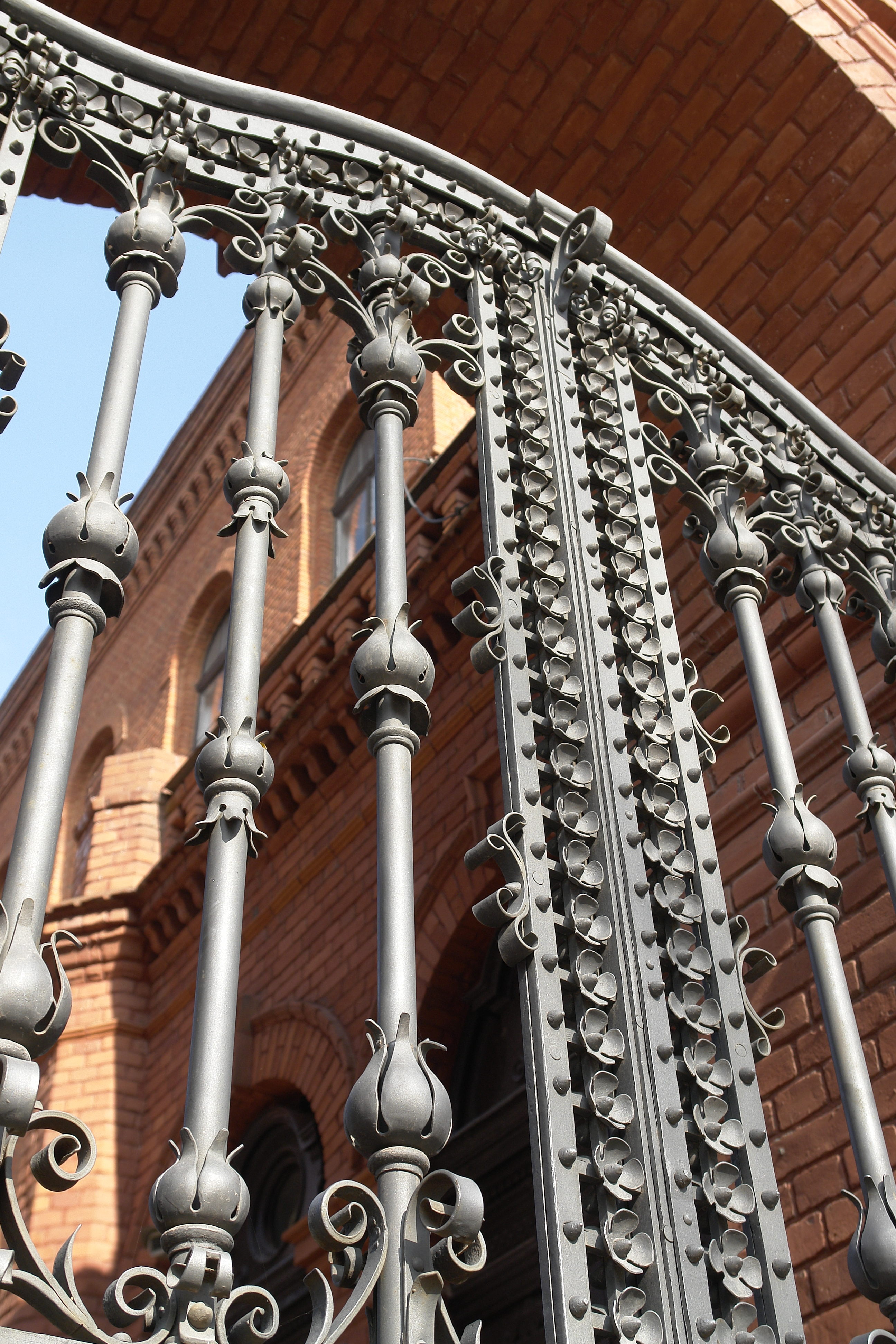 Główna brama wejściowa do łódzkiej Manufaktury